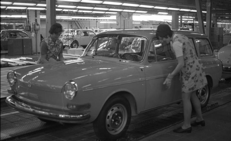 VW-Werk, Wolfsburg End-Montage